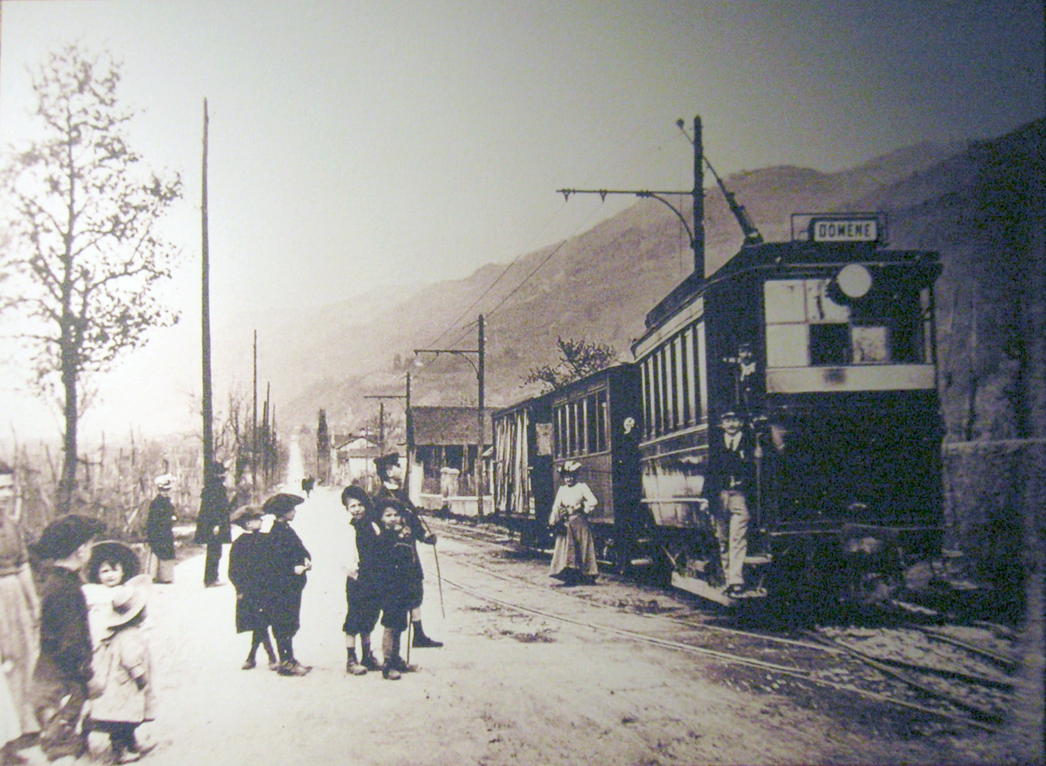 Tramway à Domène vers 1900. Photo de la collection du Musée dauphinois.